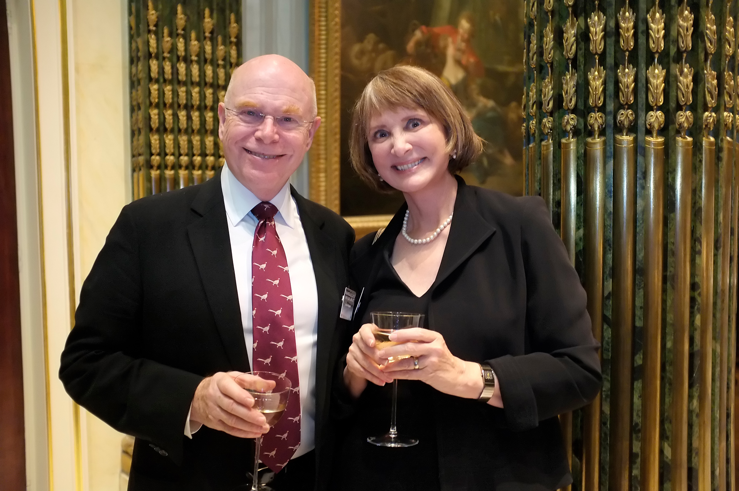 Mr Richard Rumelt, Author, and Mrs Kate Rumelt